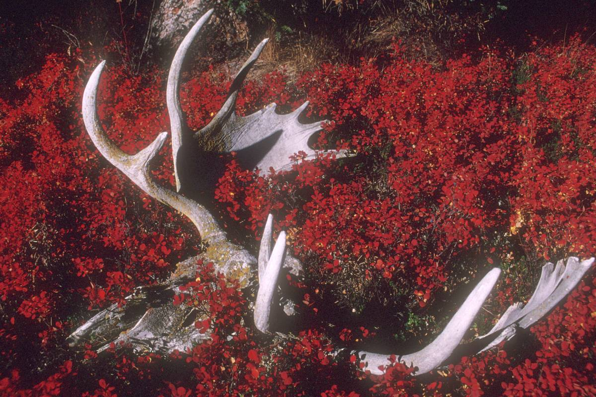 A moose skull against bright autumn foliage. Lake Clark National Park, Alaska.